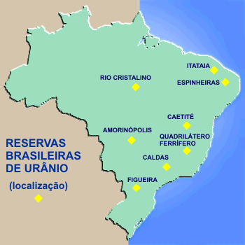 Mapa de localização das Reservas brasileiras de Urânio